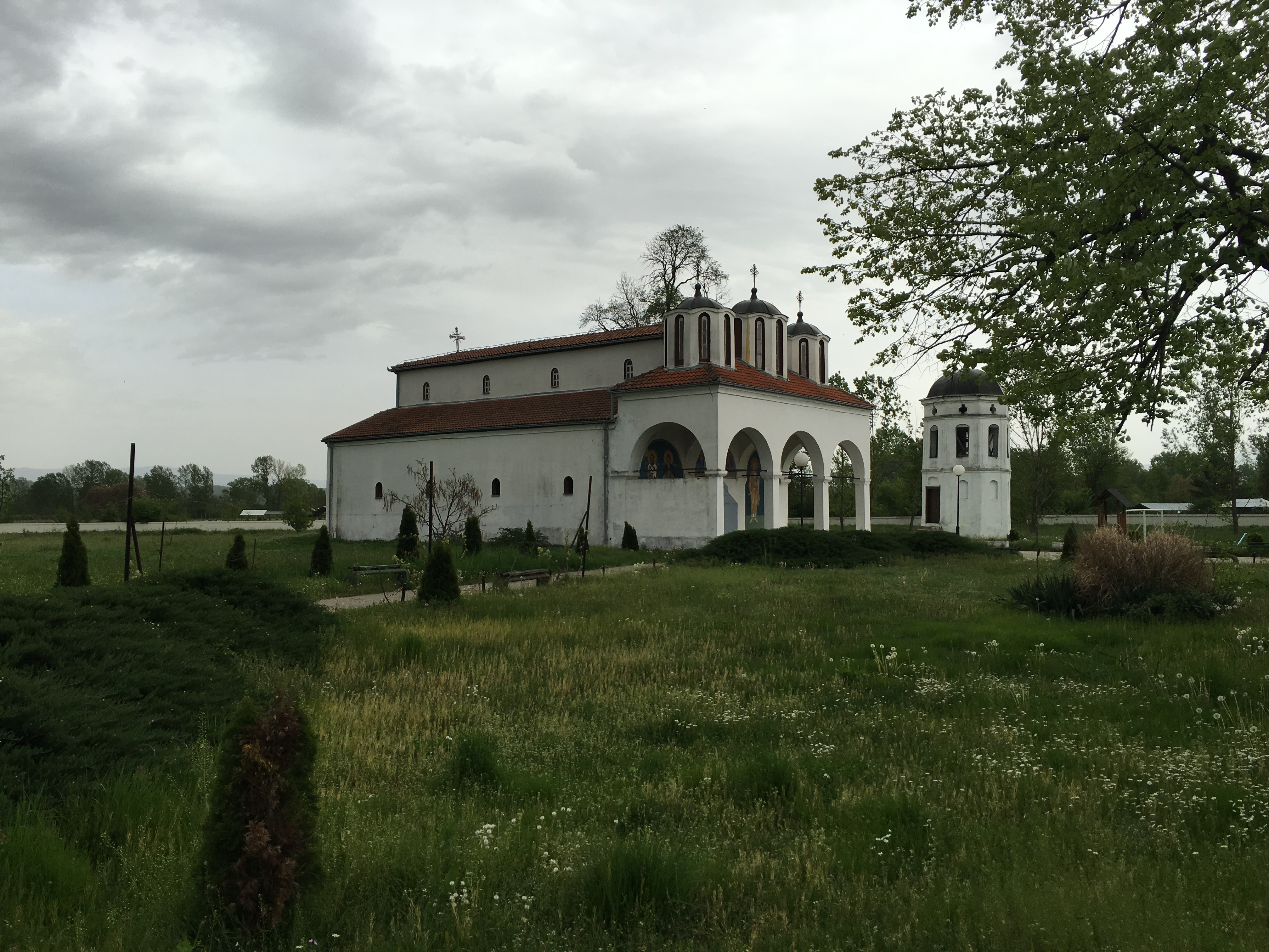 Srpski (latinica): Crkva Sabor svetih apostola, Turekovac